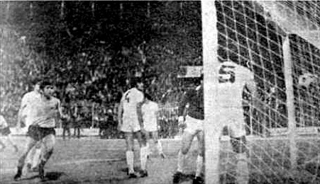 غلام وقاخوه گل مساوی را به هاپوئل می‌زند